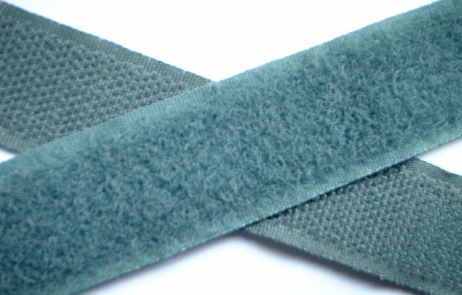 Klettverschluss